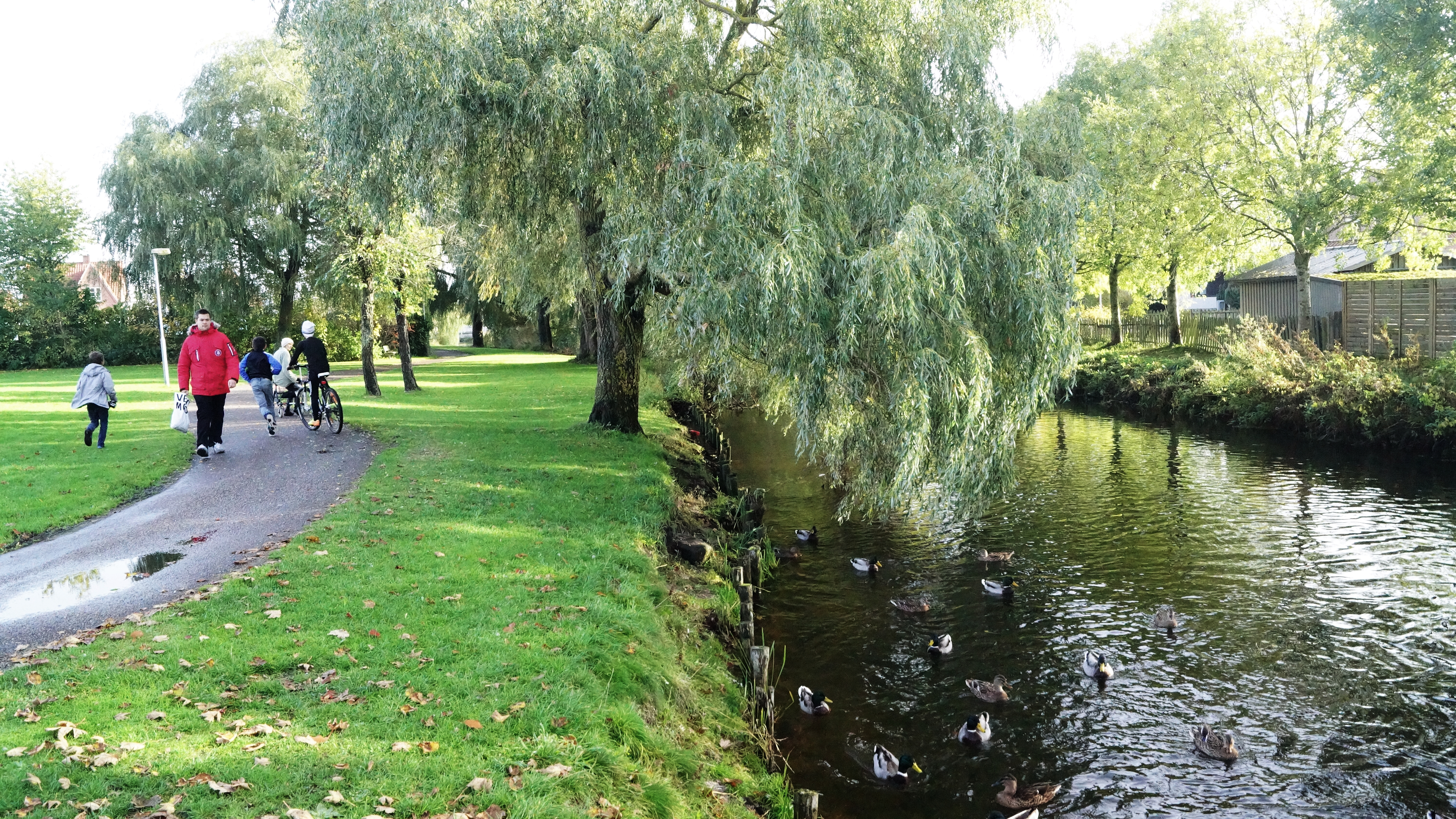 Grenå å igennem Grenå